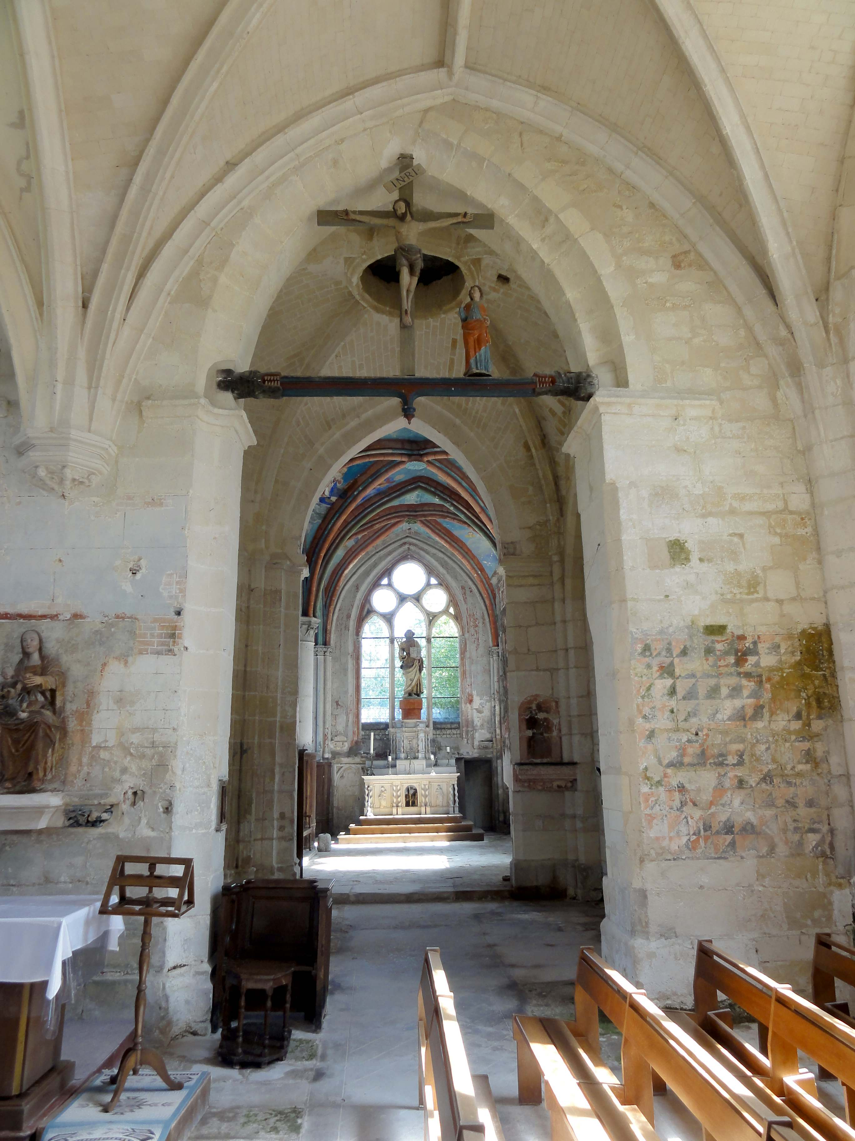 Intérieur de l'église (voir titre).